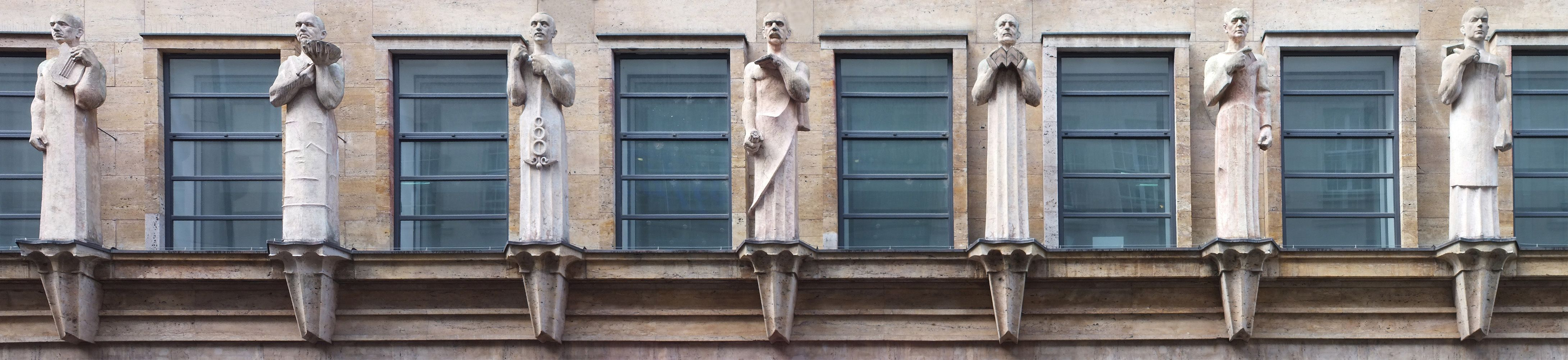 Panorama der Balustradenfiguren am Petershof in Leipzig. Neuanfertigung der 1938 entfernten historischen Figuren durch Markus GläserDie Figuren (und ihre allegorische Bedeutung) von links: Baudirektor Ludwig Fraustadt (Musik), Kommerzienrat Felix Geissler (Kunstgewerbe), Jüdischer Bankier Hans Kroch (Handel), Oberbürgermeister Karl Rothe (Schauspiel), Messedirektor Raimund Köhler (Messen), Architekt Alfred Liebig (Architektur) und Messevorstand Edgar Hoffmann (Industrie)